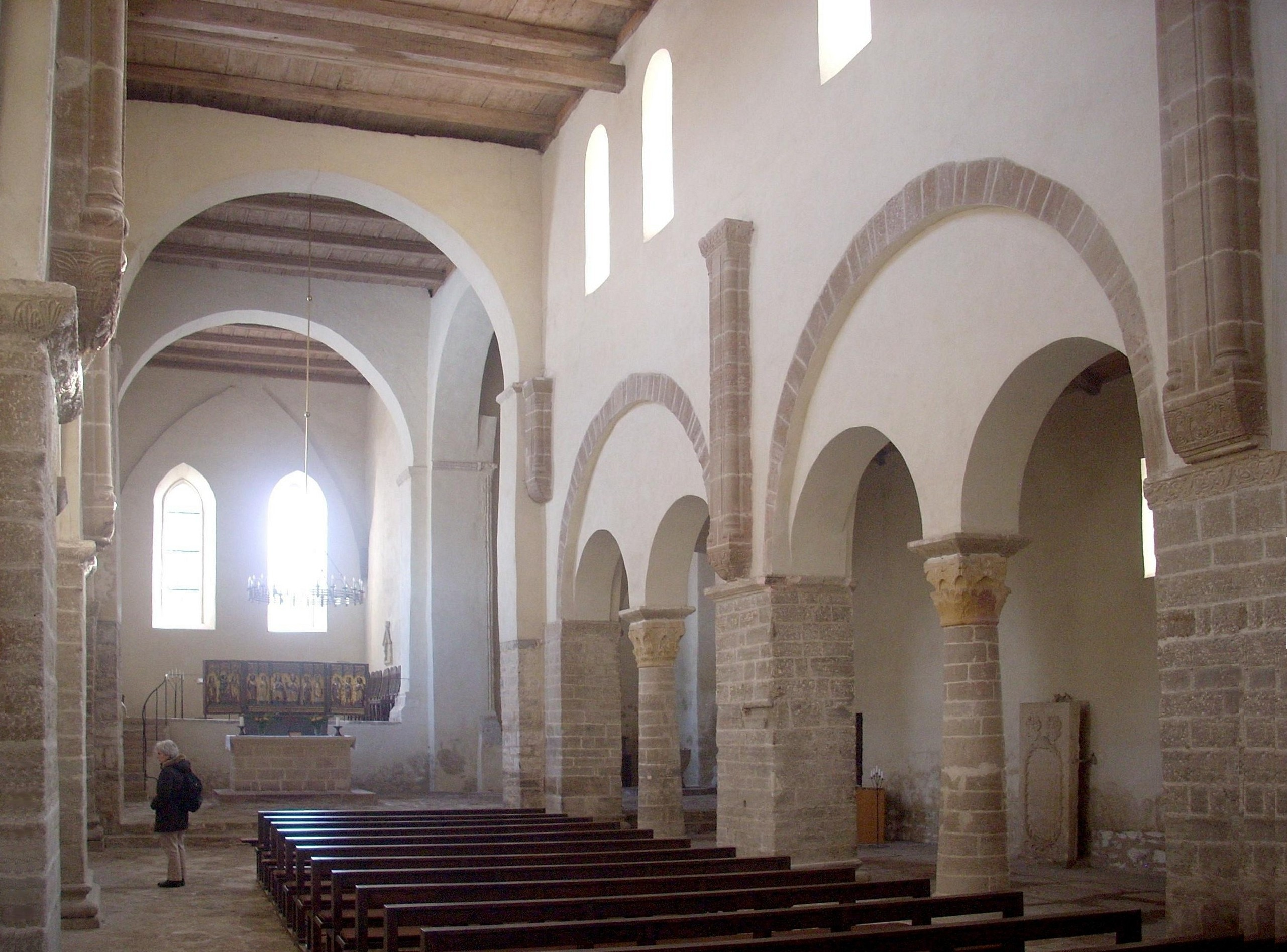 Kloster Drübeck, Inneres, Blick nach Osten